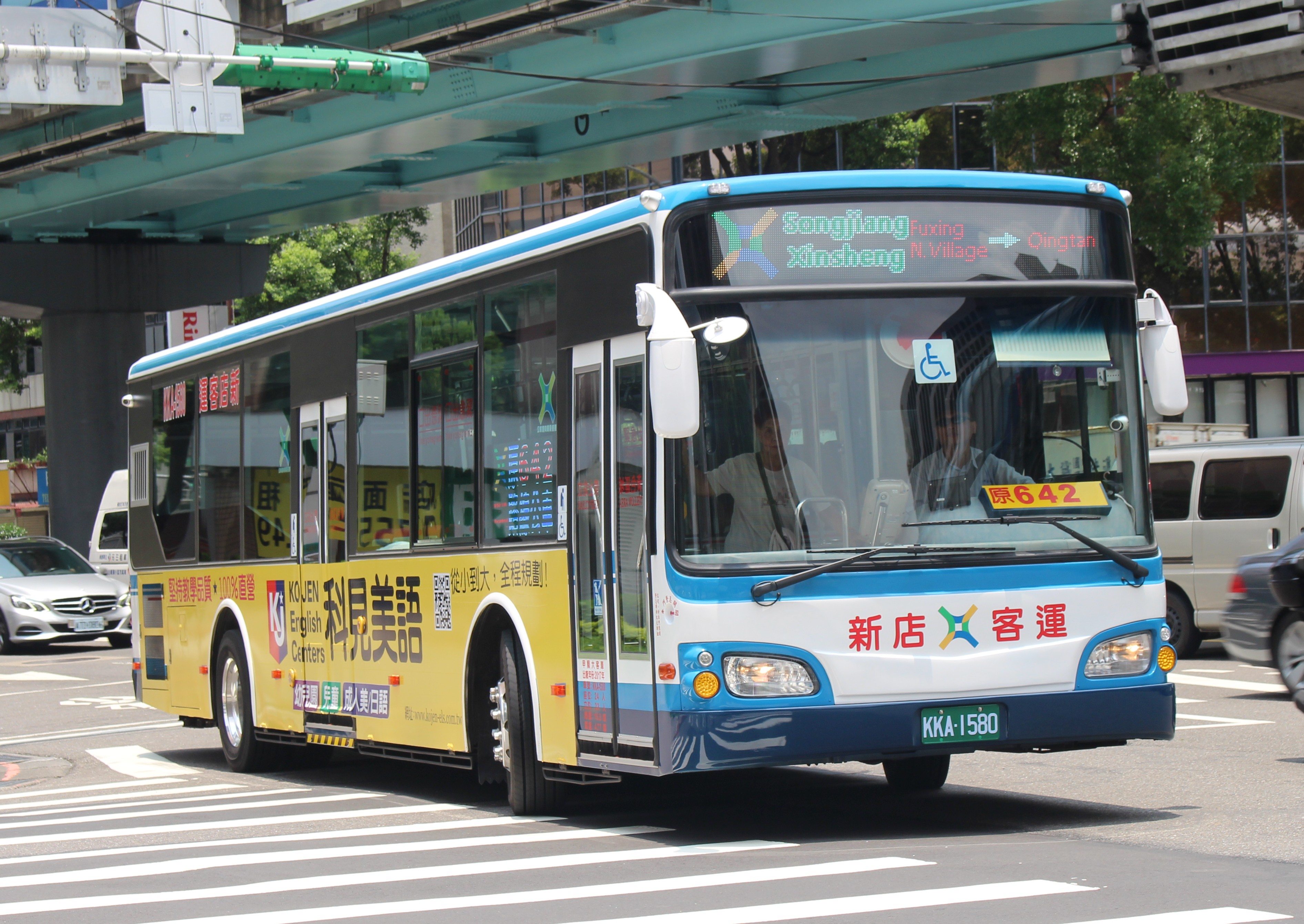 新店客運 2017 HINO HS8JRVL-UTF KKA-1580 松江新生幹線